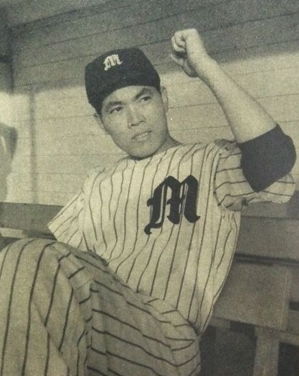 山内和弘